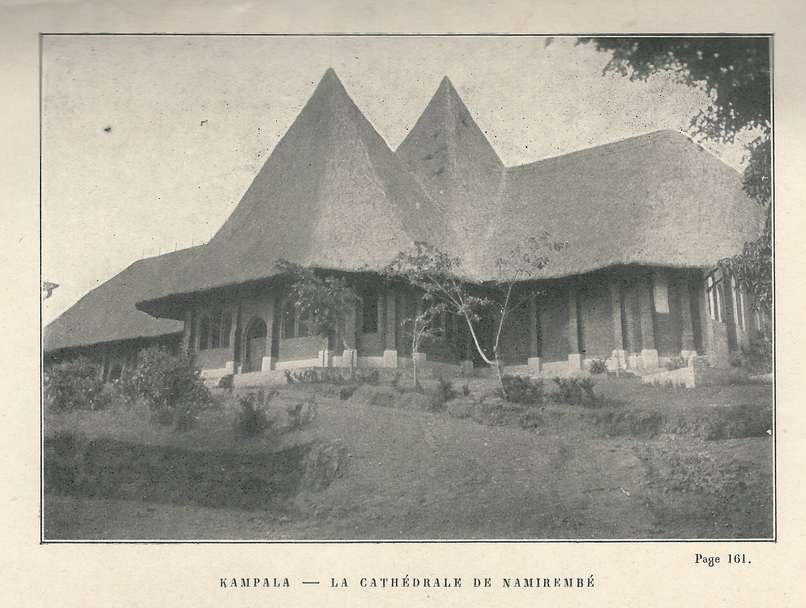 Illustration de l'ouvrage : Jules Leclercq , Aux sources du Nil par le chemin de fer de l'Ouganda, 1913